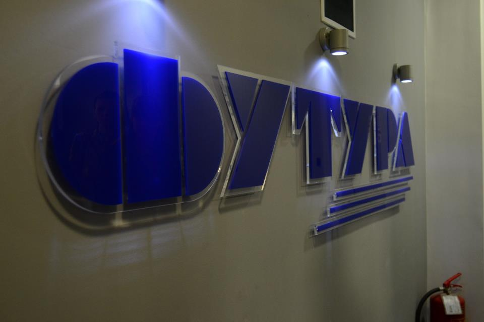 Футура ПП